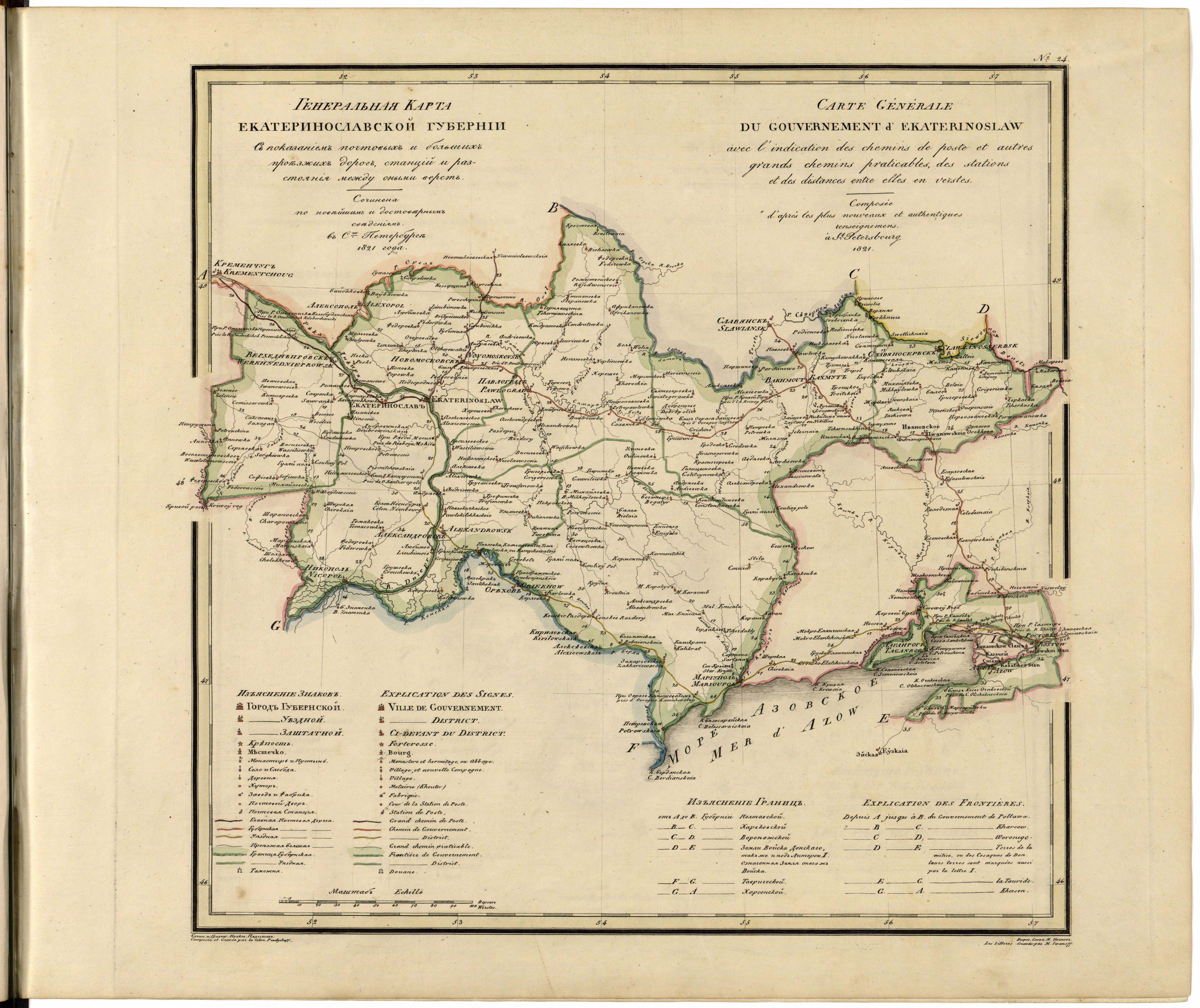 Генеральная карта Екатеринославской губернии